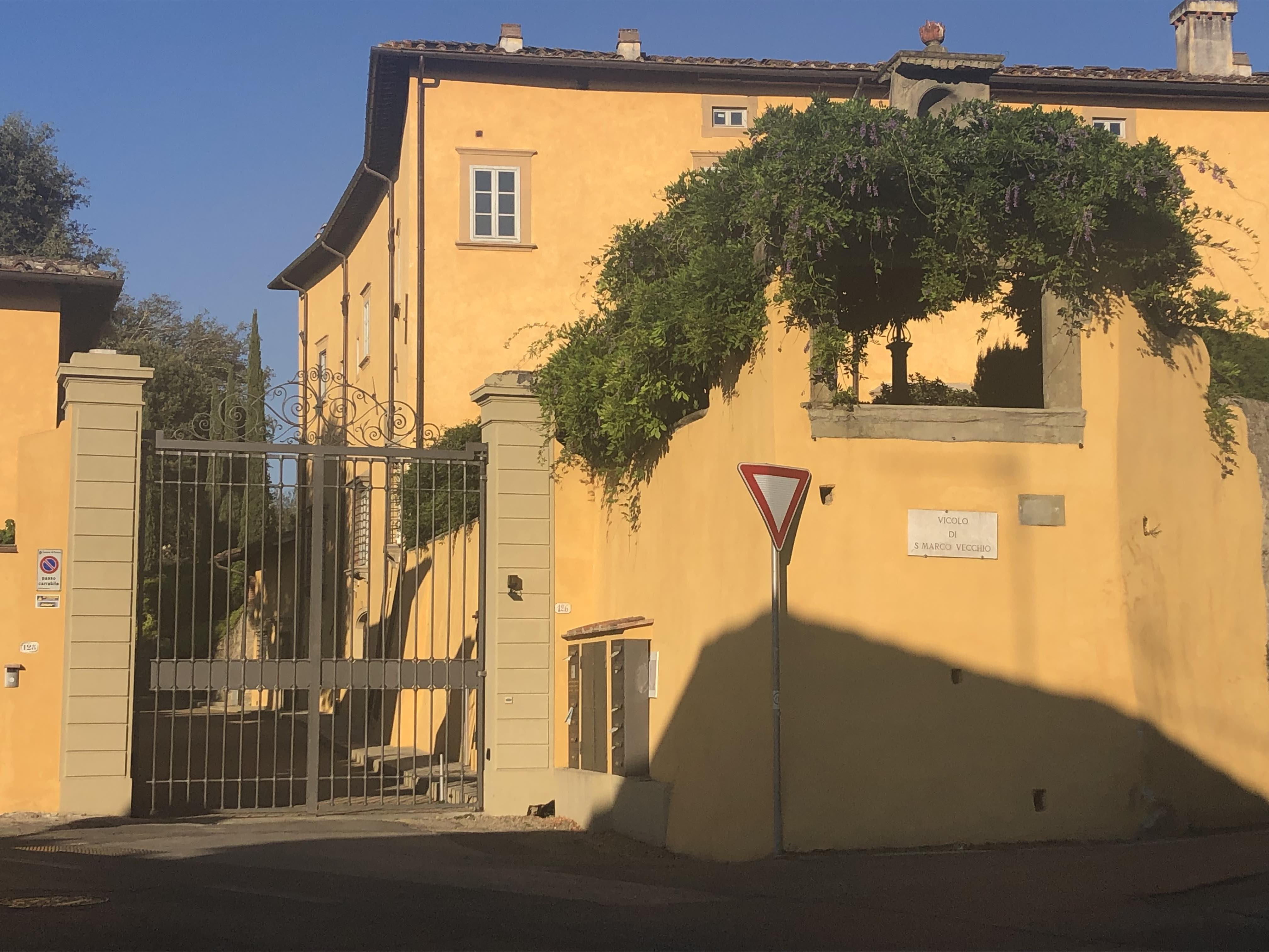 Restauro ingresso Villa 2019